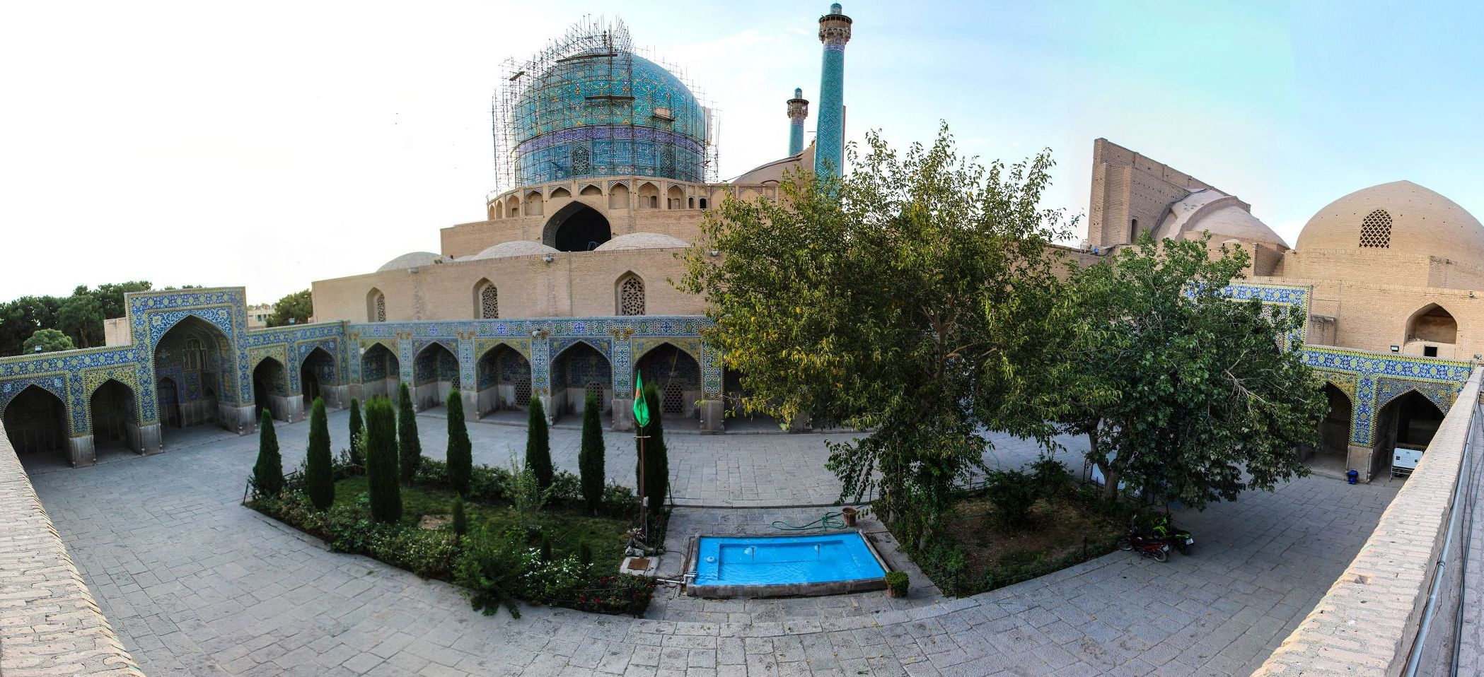 مدرسه علميه ناصريه (مسجد امام اصفهان/ مسجد شاه عباس/ مسجد جامع صفوي)